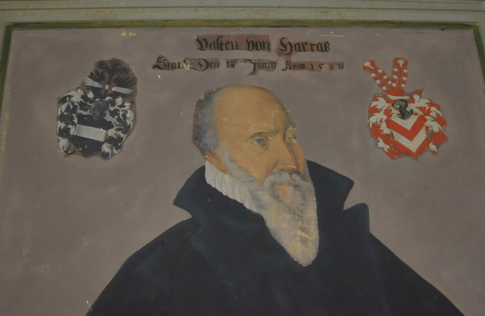 Porträt eines von Harras in de Kirche von Magdala